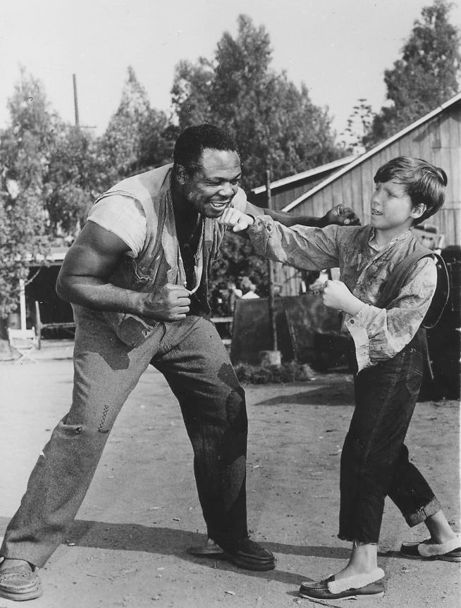 Boxer Archie Moore & Eddie Hodges star in Huckleberry Finn 1960 Press Photo